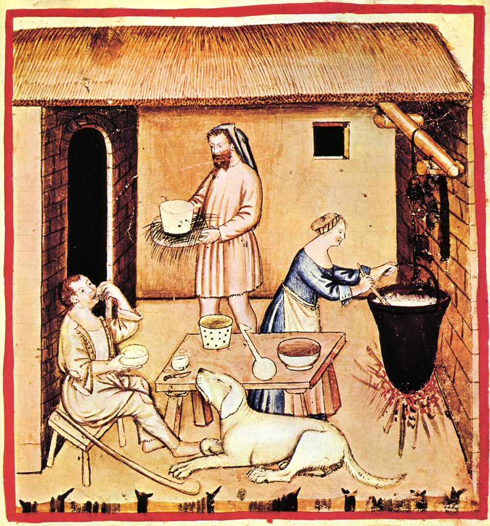 Tacuina sanitatis (XIV century) -alimenti, formaggi,Taccuino Sanitatis, Casanatense 4182.